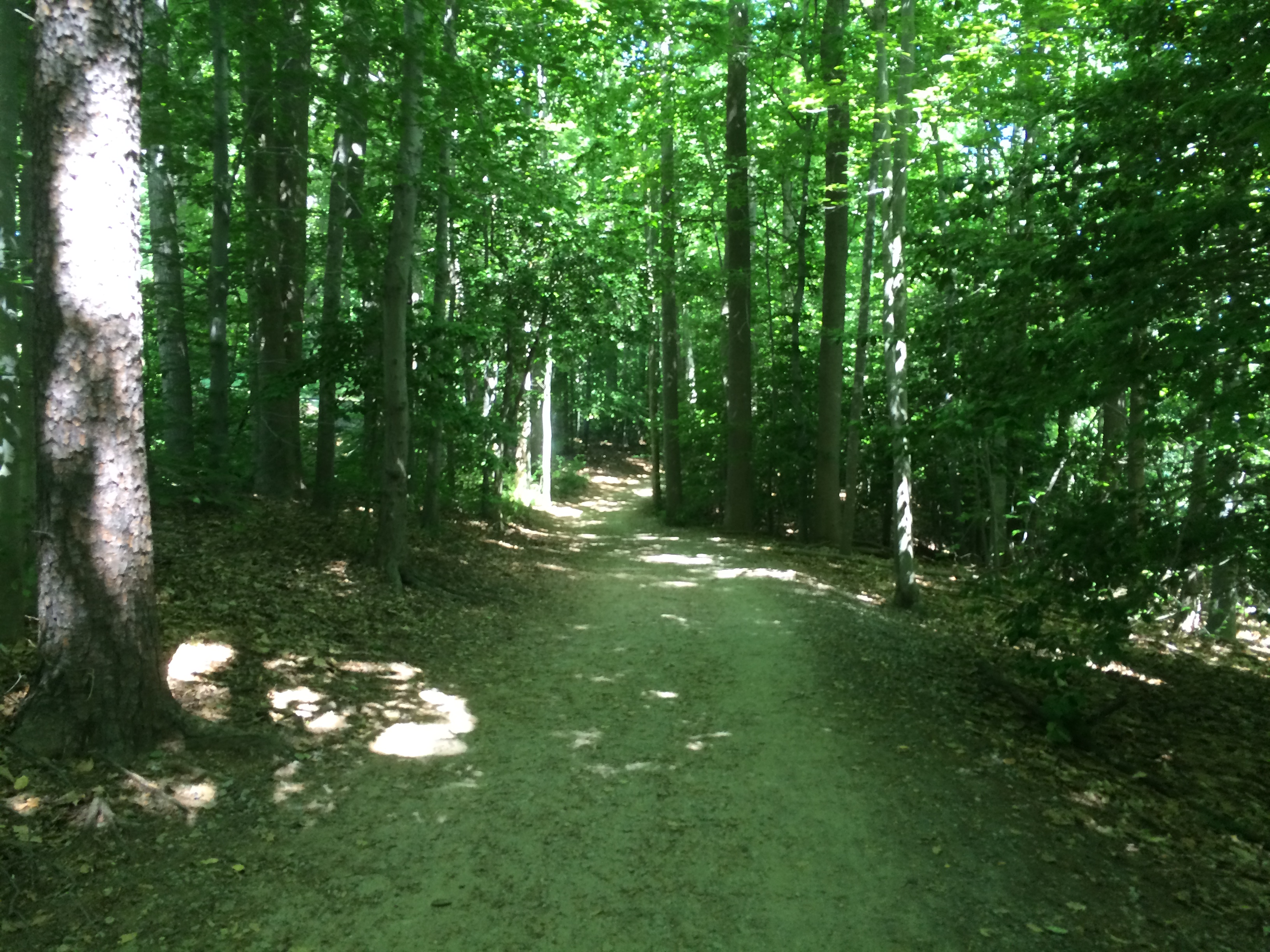 Burke Lake Park